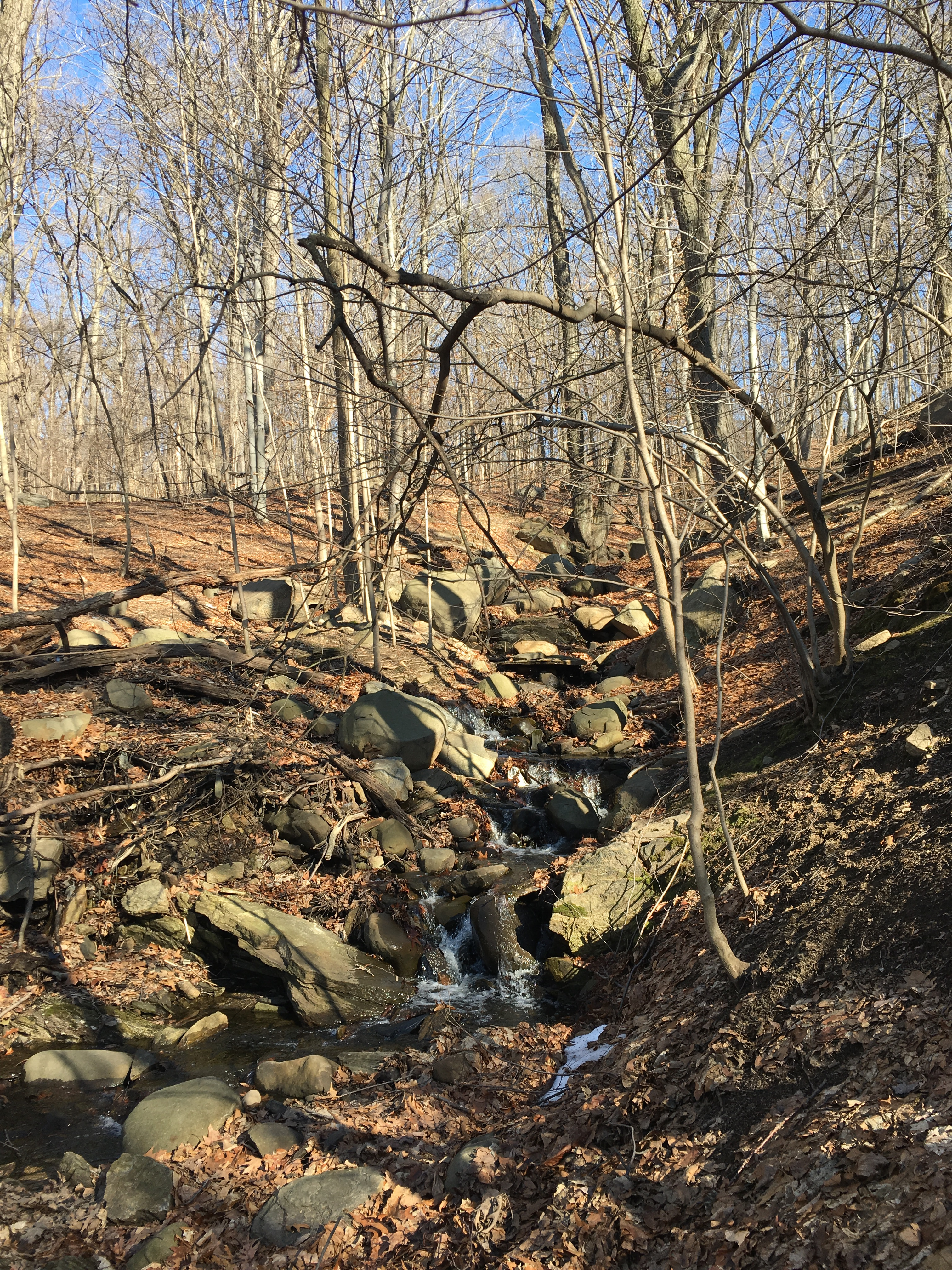 Van Cortlandt Park, Bronx, NY